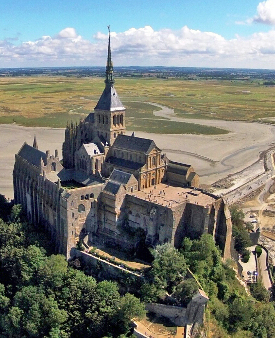 Vue aérienne de l'abbaye du Mont-Saint-Michel